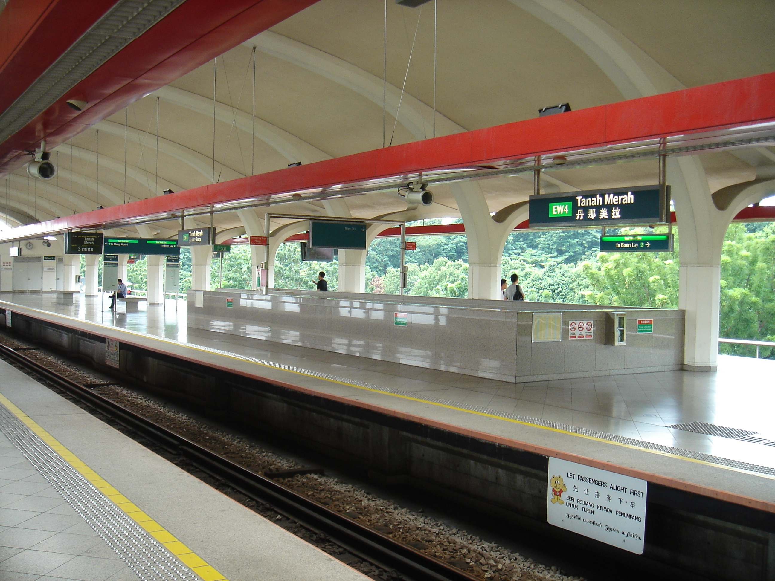 Tanah Merah MRT Station, Tanah Merah, Singapore.